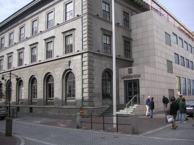 landsbankinn